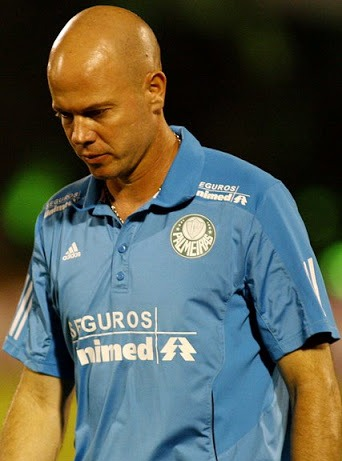 Antônio Carlos como treinador do Palmeiras em 2010.